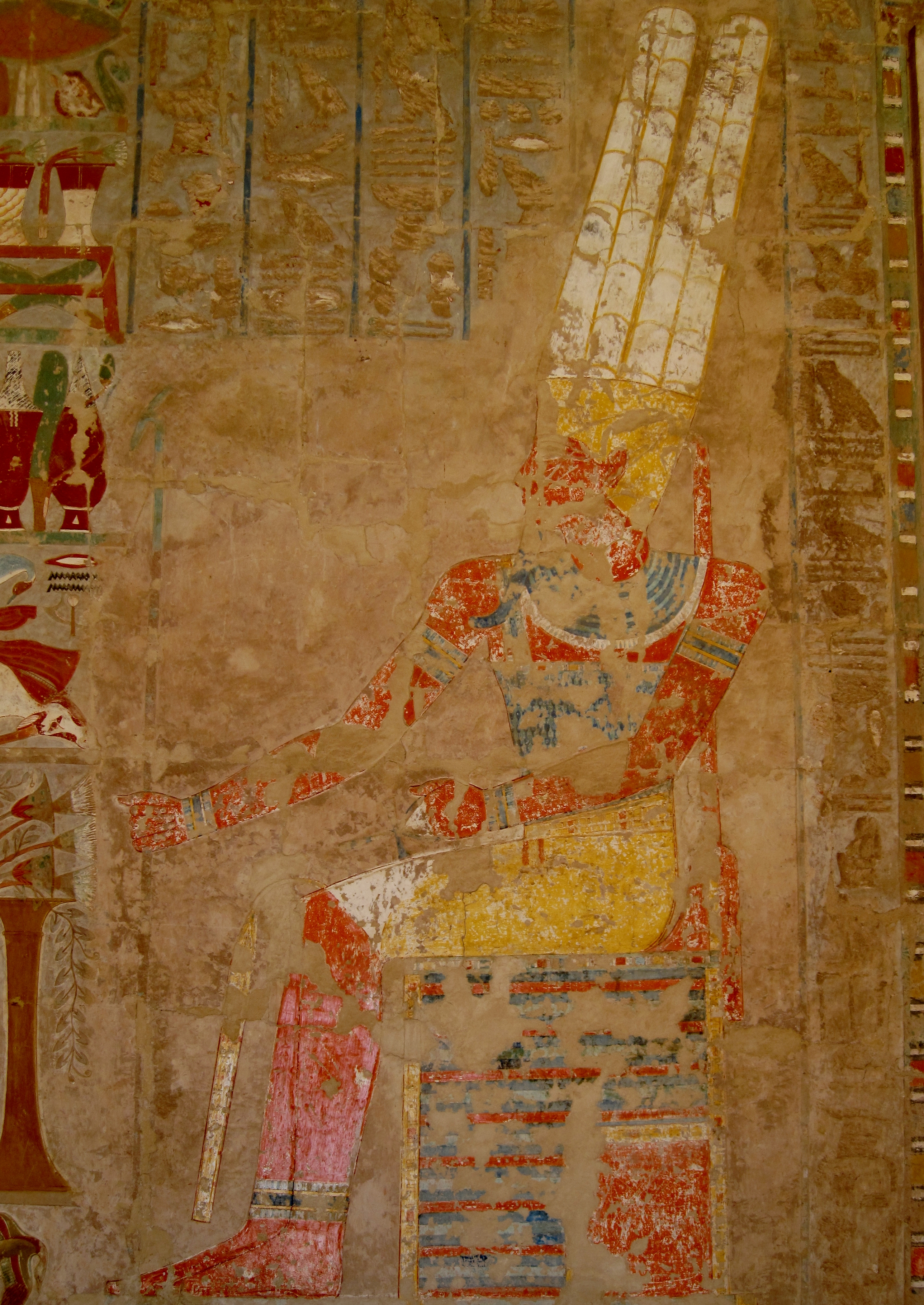 Wandbild im Totentempel der Königin Hatschepsut in Deir el-Bahari (arabisch für „Nordkloster“), Theben-West (Luxor), Ägypten